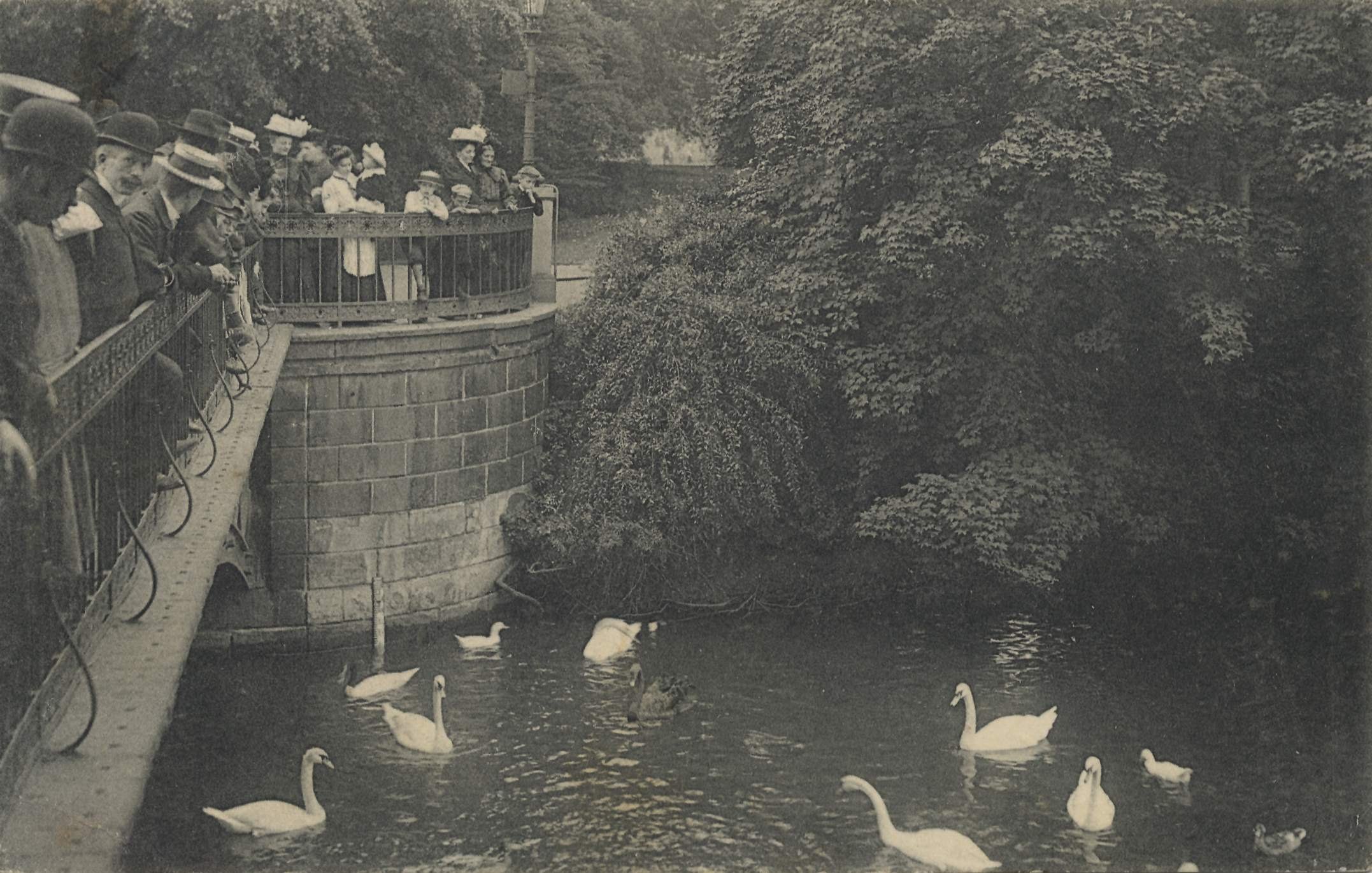 Goldene Brücke im Hofgarten